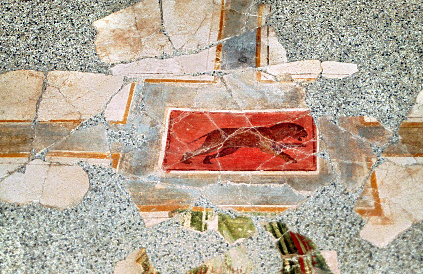 Pantherdarstellung auf dem 1992 entdeckten Deckenfresko im György Klapka Múzeum, Komárom, Ungarn.